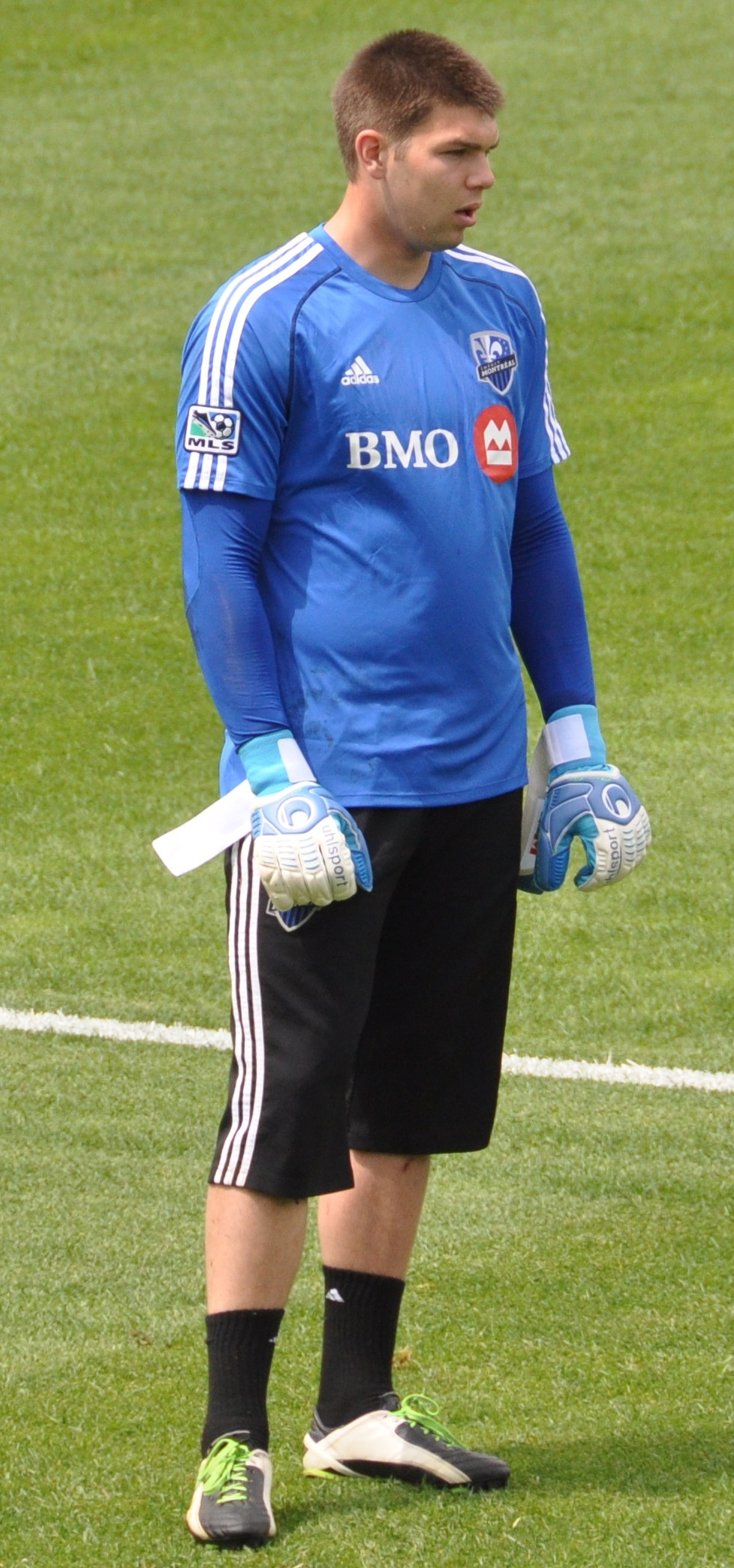 Avant le match : Impact Montréal - Real Salt Lake